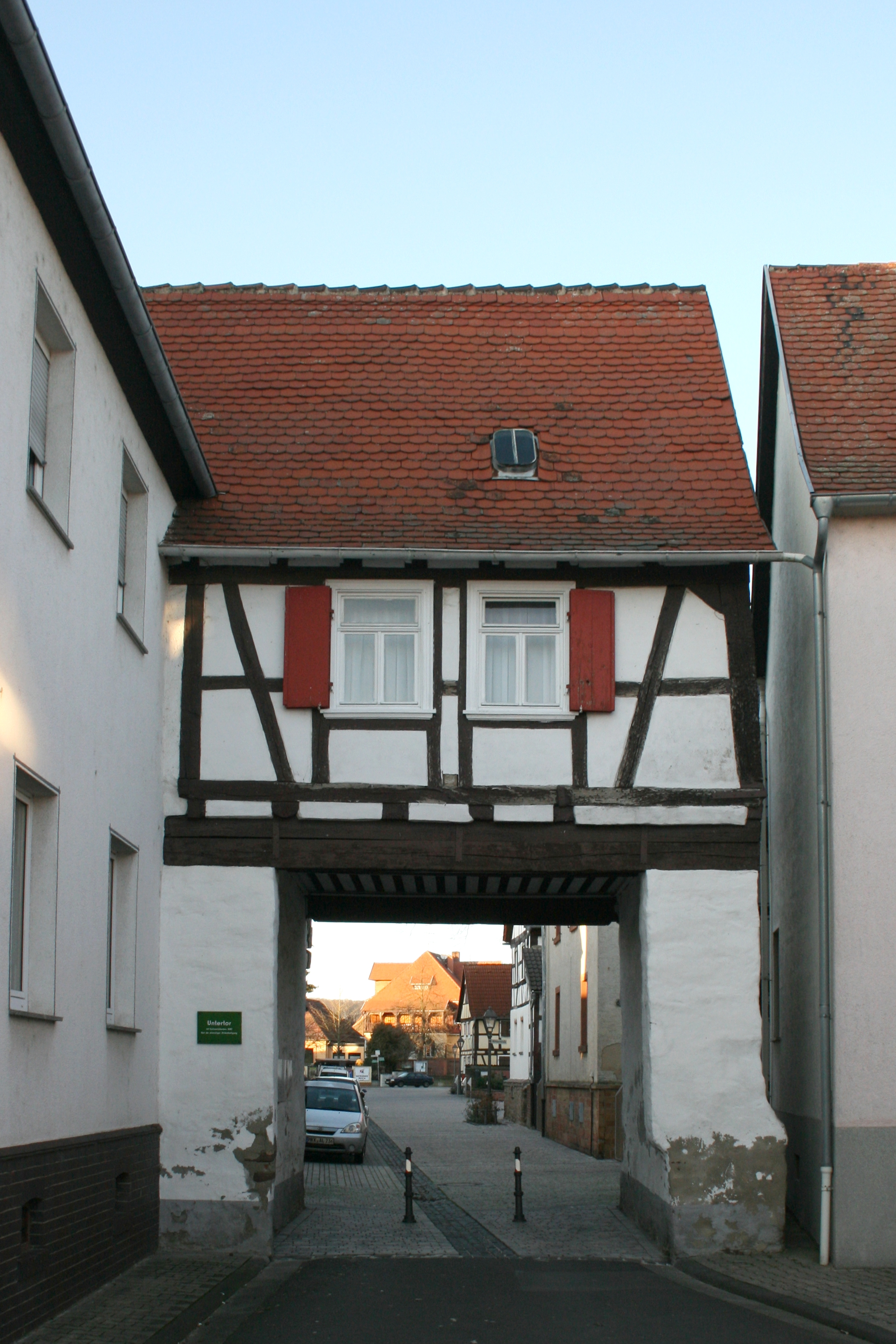 Nidderau-Eichen, Untertor von 1682 mit Fachwerkobergeschoss